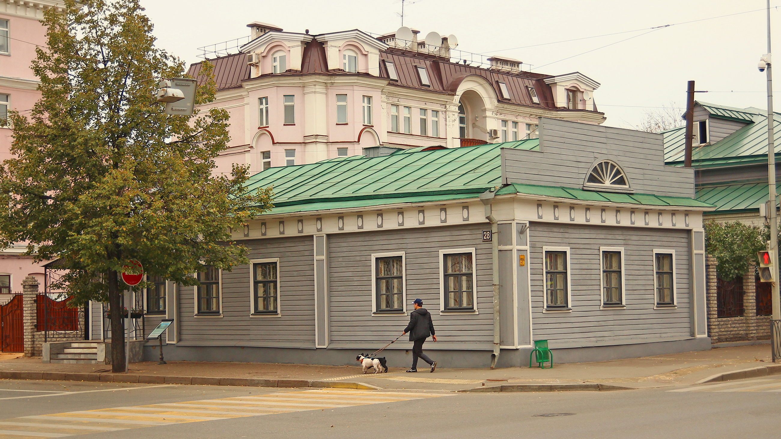 Усадьба Баратынского (Республика Татарстан, Казань, Горького улица, 25-а, 25, Муштари улица, 28)